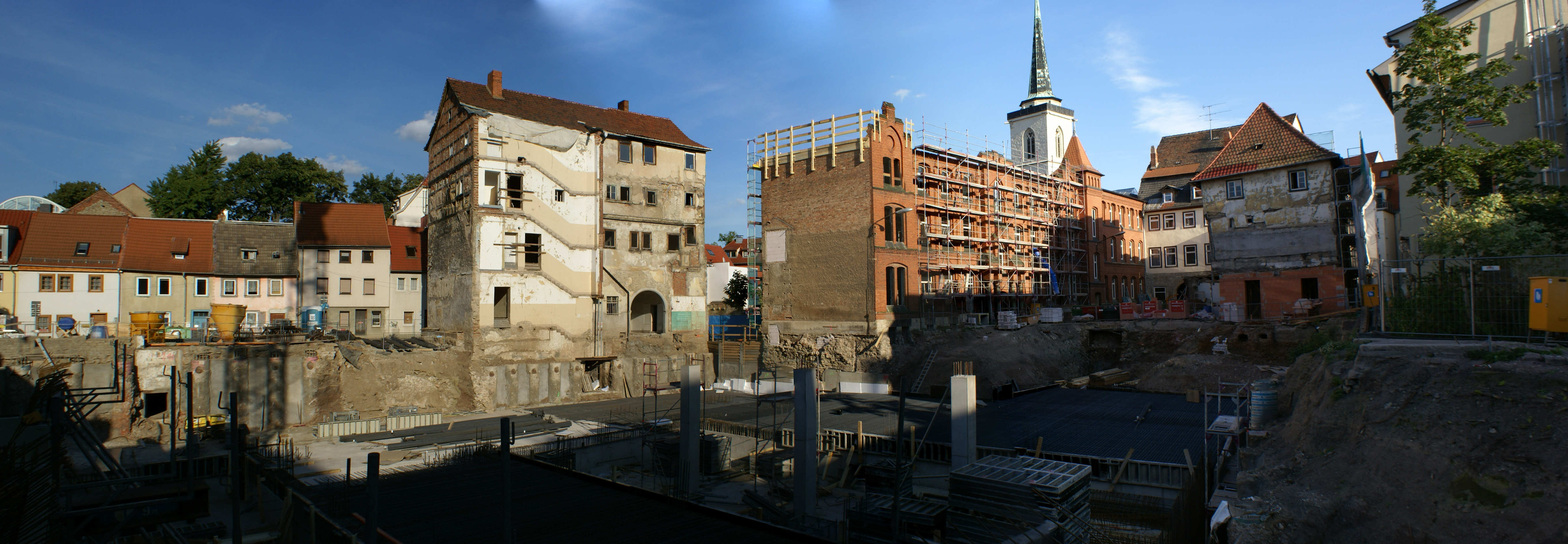 Bauarbeiten im Wohnpark "Chrestensenhof" - Marktstraße in Erfurt.